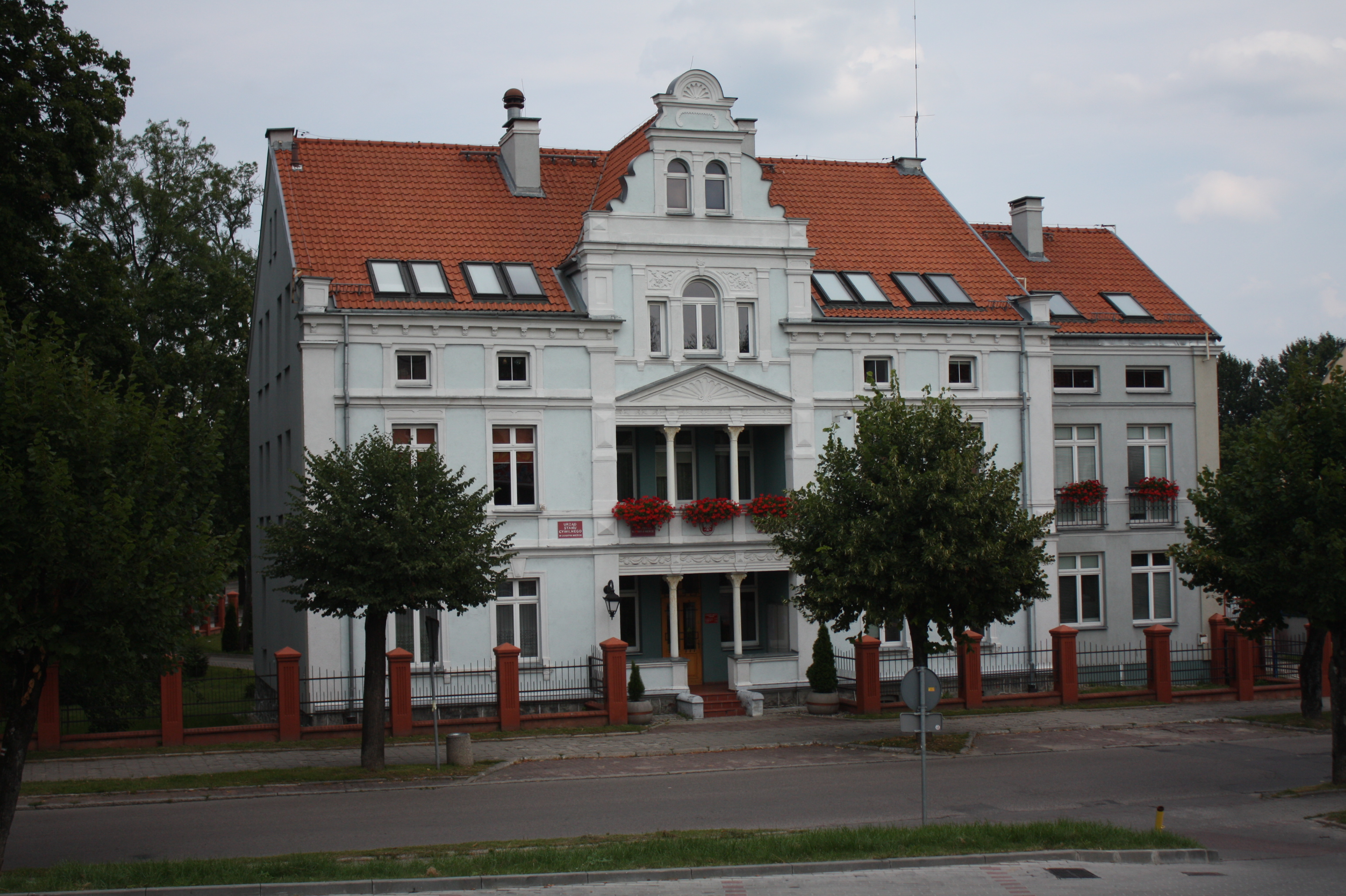 Dobre Miasto - ul. Warszawska 14 You can see all photographs in category Wikiekspedycja 2012. The making of this document was supported by Wikimedia Polska.